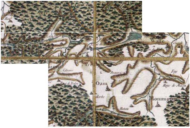 Carte des années 1780 du territoire d'Ohain (ou d'Oain à l'époque)